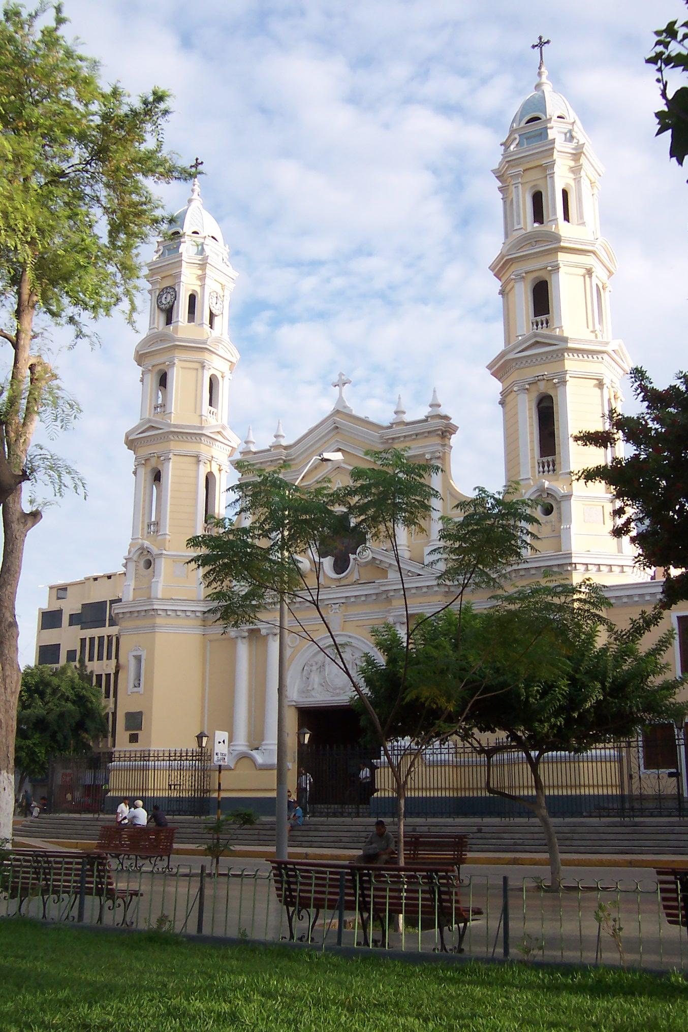 Catedral de Piura Autor: Alfredobi Fecha: marzo 2006